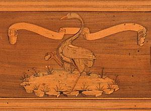 Stdiolo di guidobaldo da montefeltro